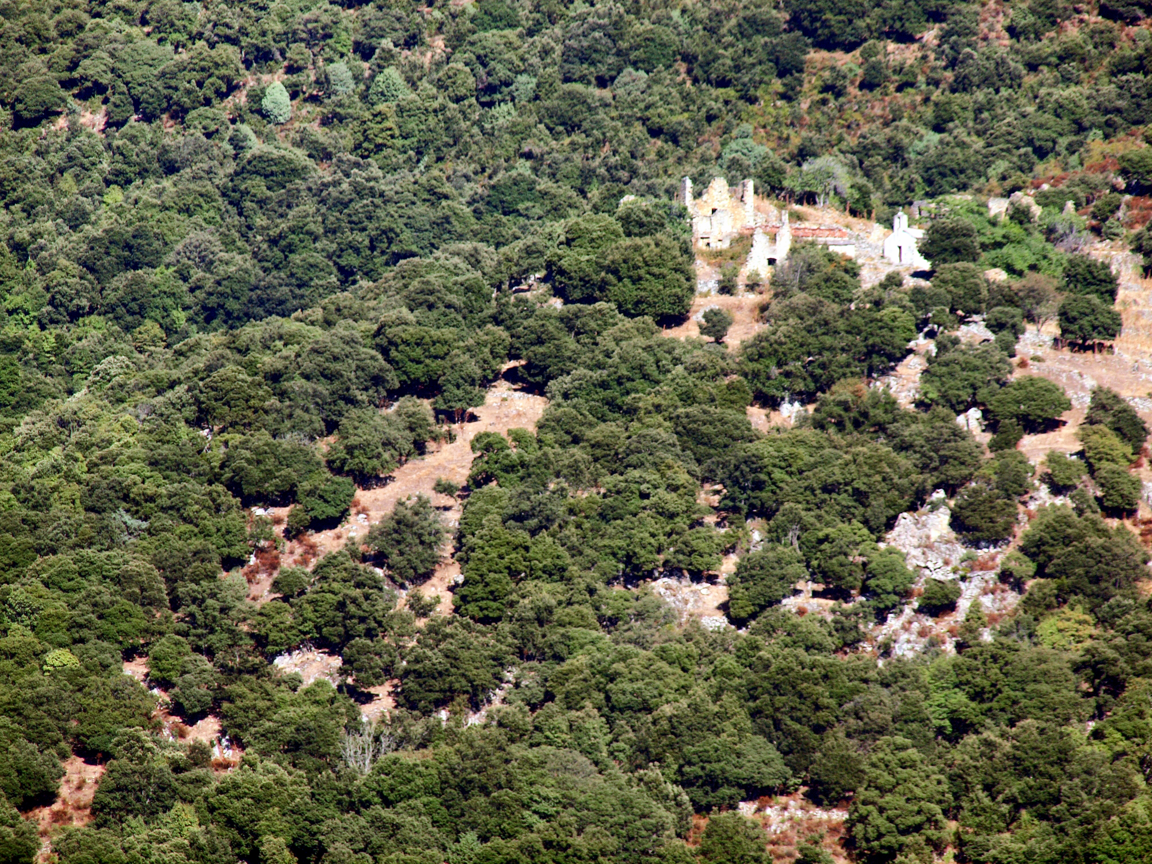 Pietralba, Balagne (Corse) - Case Nove ancien village en ruines, vu depuis Pedano.